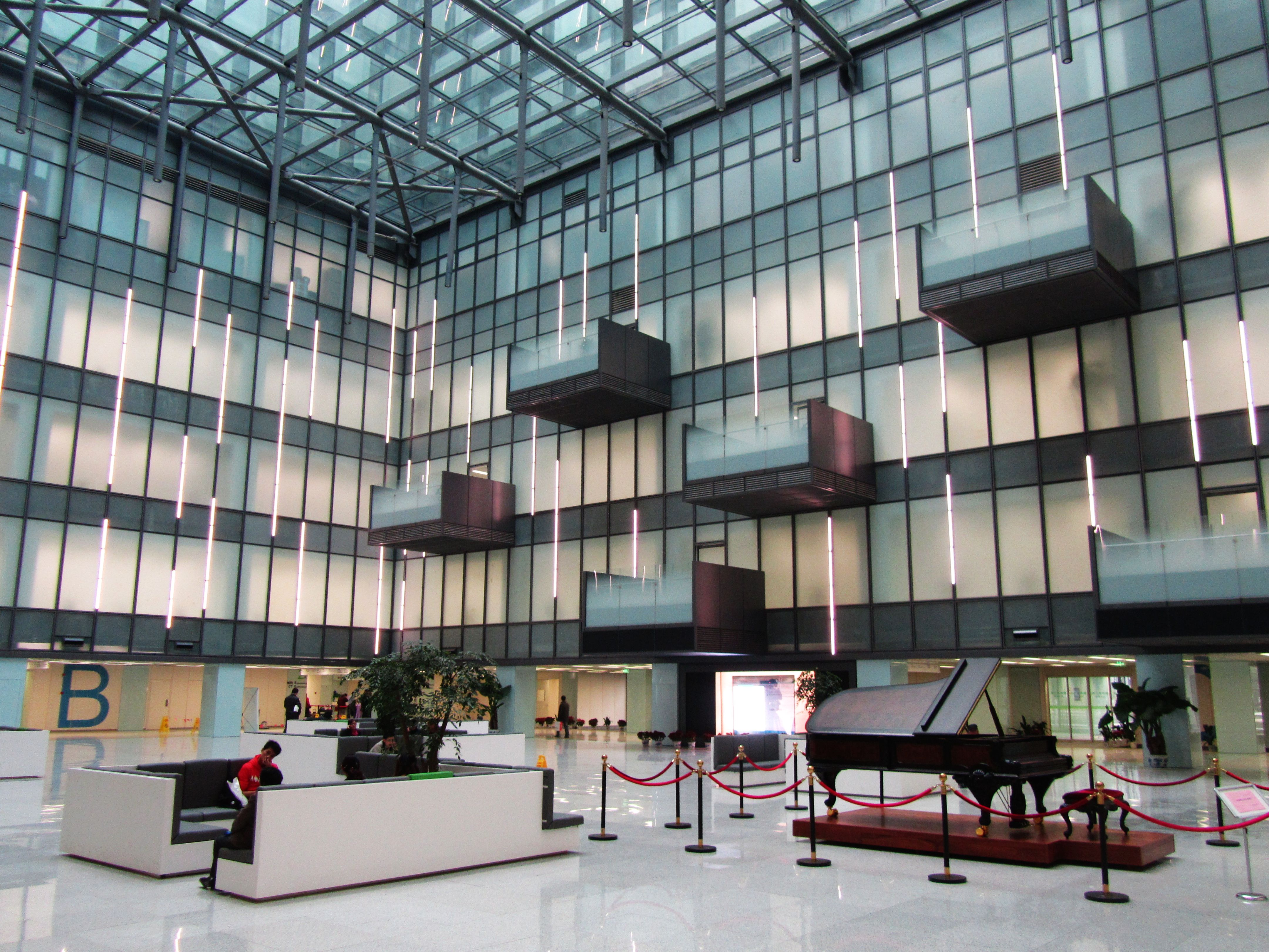 鼓楼医院三期建筑，即其南扩工程，此为其内部中庭。